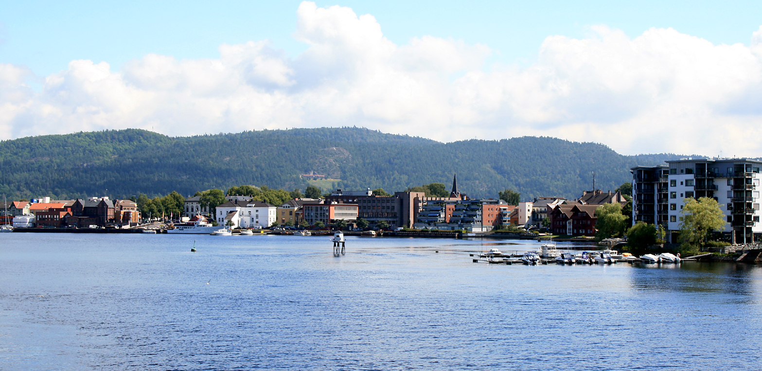 Porsgrunn, Norway.